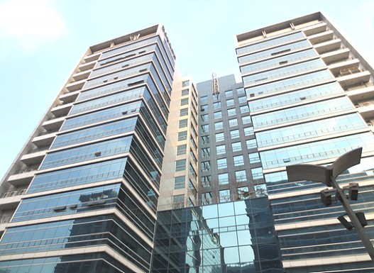 오토아이티 본사